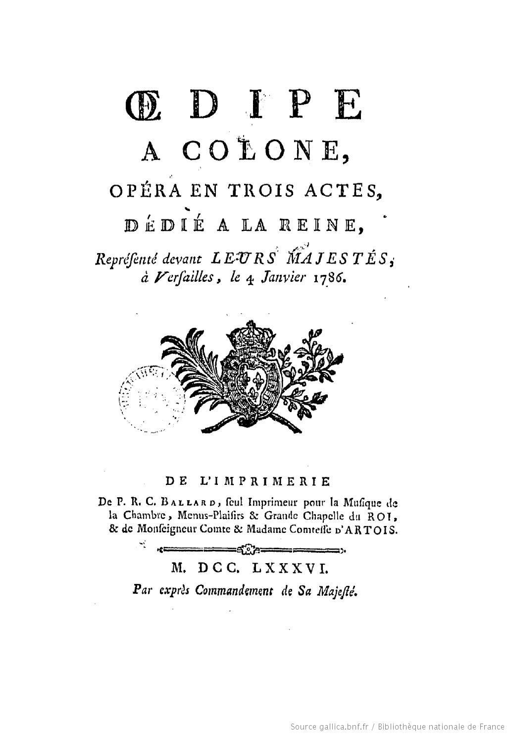 Frontespizio dell'Category:Œdipe à Colone di Antonio Sacchini